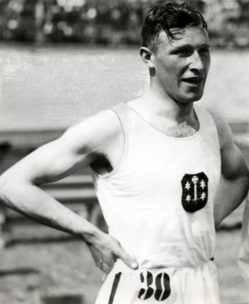 Chris Berger wint in 1932 tijdens de kwalificatiewedstrijd voor deelname aan de Olympiade in Los Angeles het onderdeel 100 meter hardlopen voor heren.